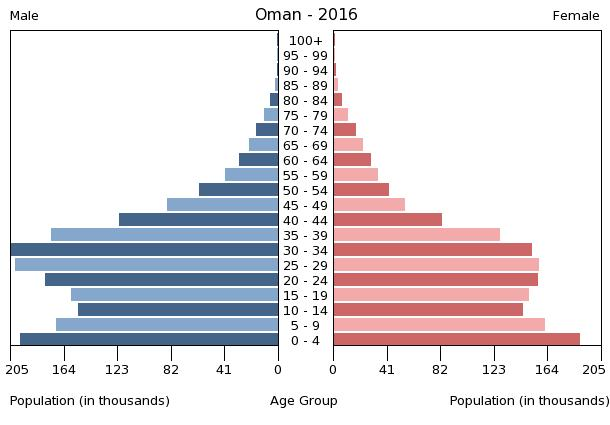 A population pyramid illustrates the age and sex structure of a country's population and may provide insights about political and social stability, as well as economic development. The population is distributed along the horizontal axis, with males shown on the left and females on the right. The male and female populations are broken down into 5-year age groups represented as horizontal bars along the vertical axis, with the youngest age groups at the bottom and the oldest at the top. The shape of the population pyramid gradually evolves over time based on fertility, mortality, and international migration trends.